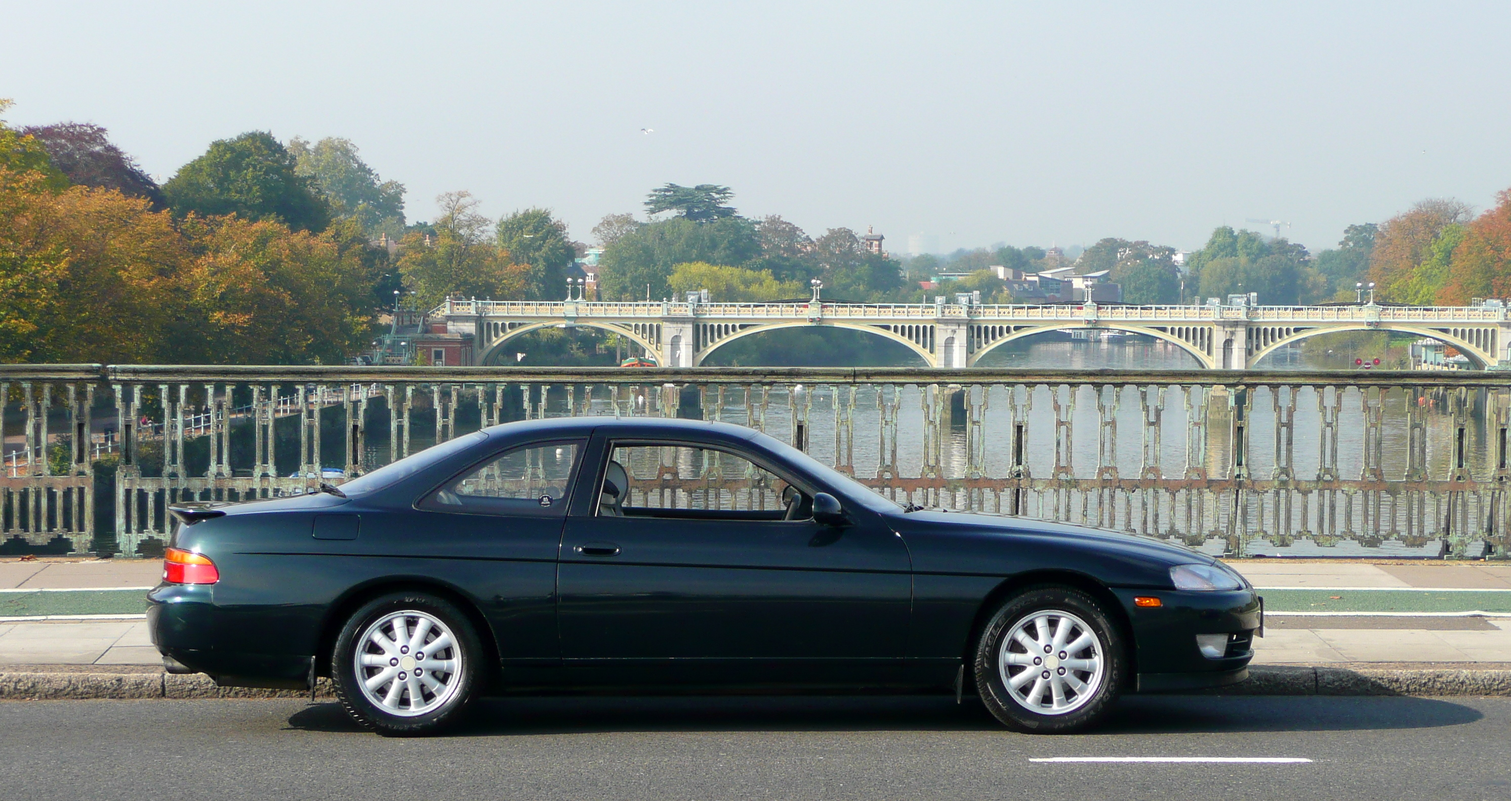 Post Supagard